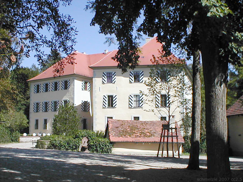 Unterschloss in Adelsheim